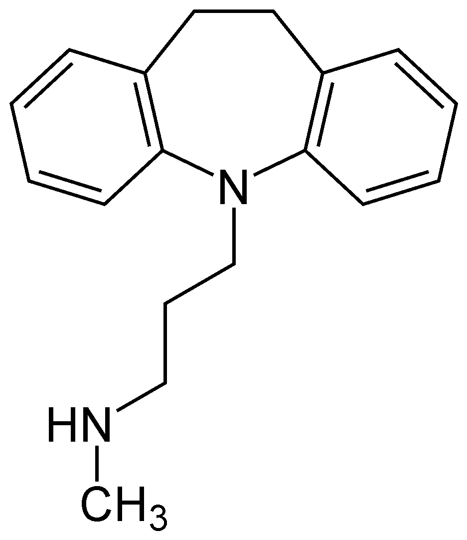 Desipramine (en) Desipramin (de)